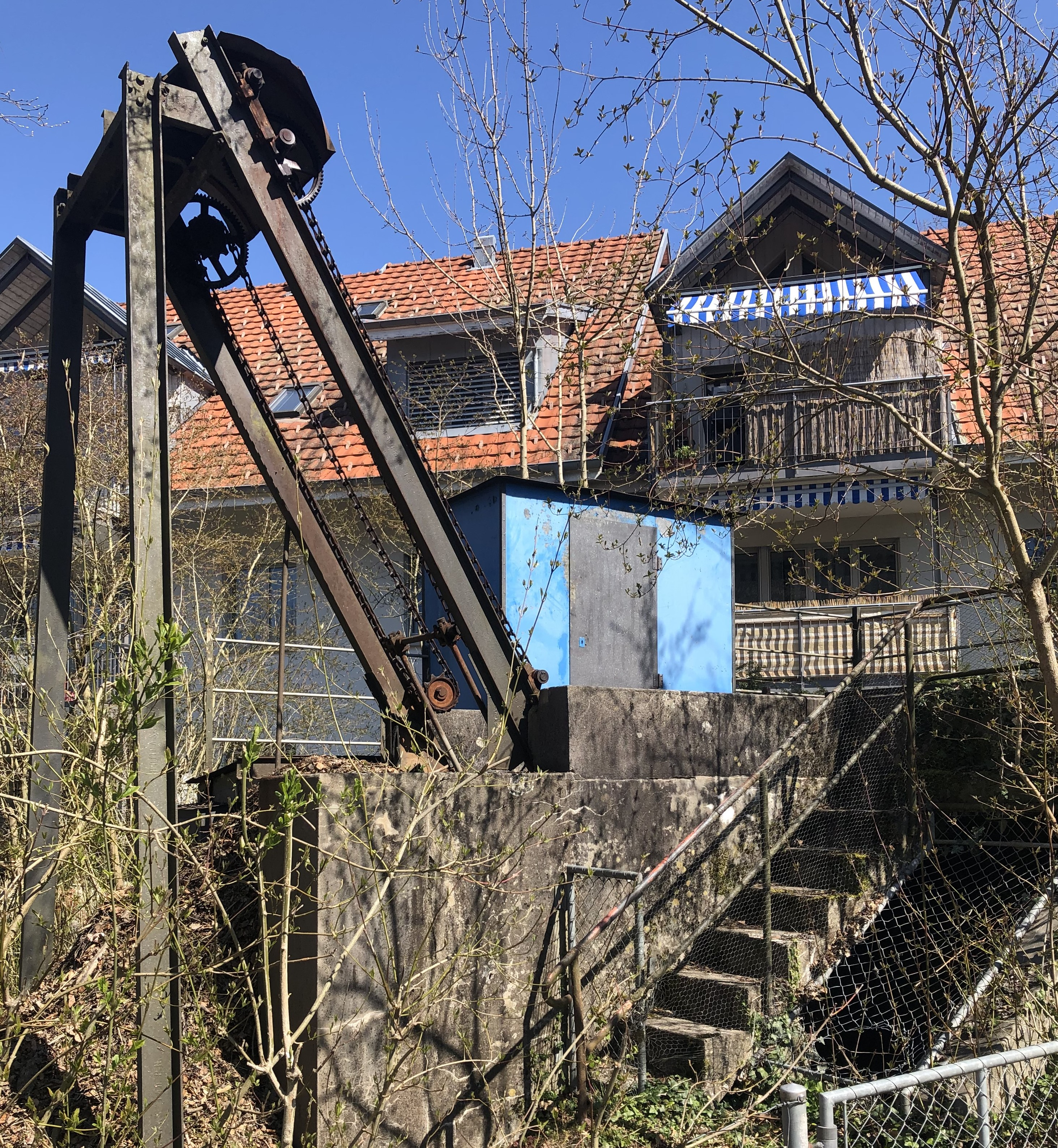 Eymatt Sperrwerk Mühlgraben